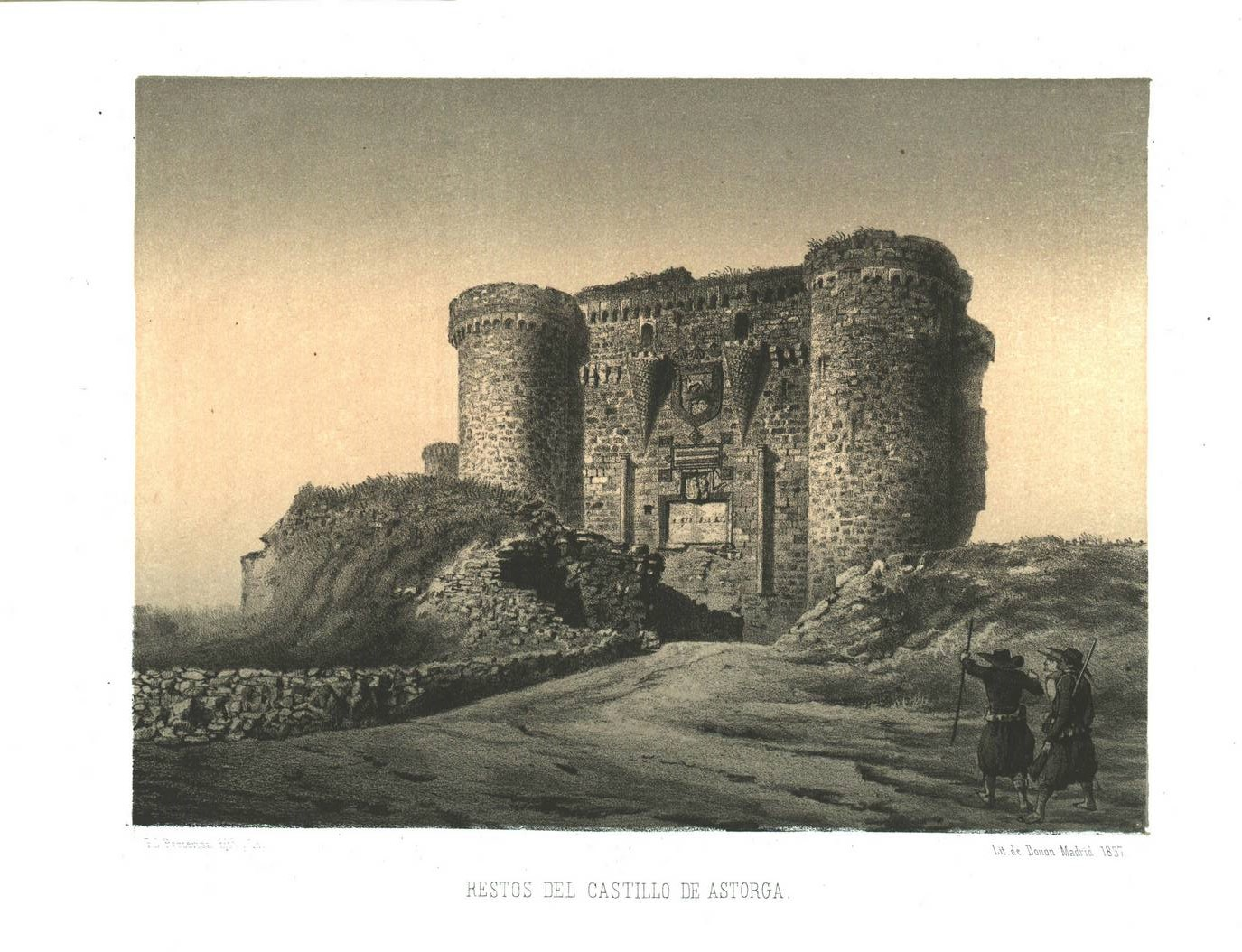 Restos del castillo de Astorga, provincia de León, España.